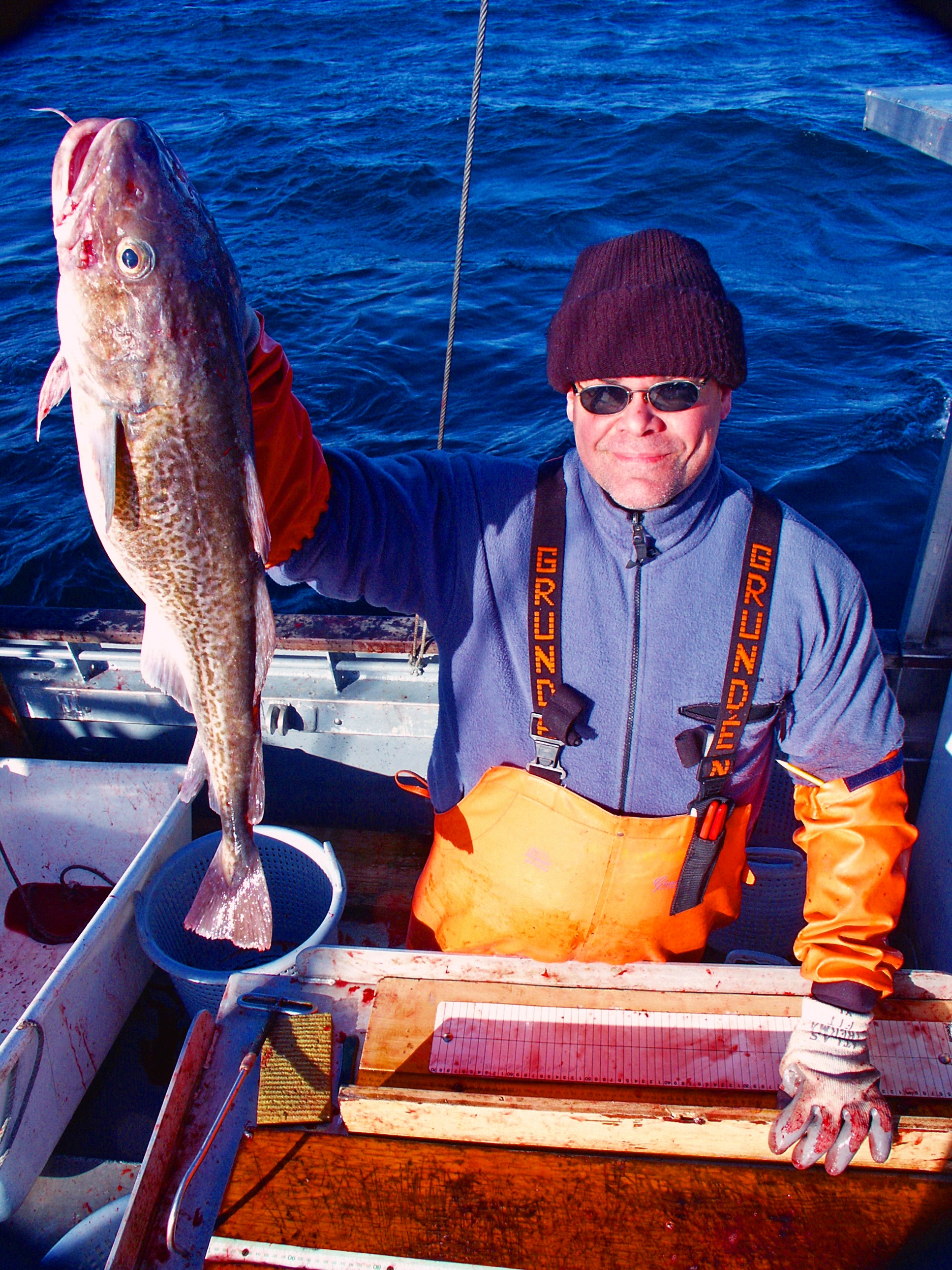 Marco Delli Paoli appena cacciato dalla pancia della madre